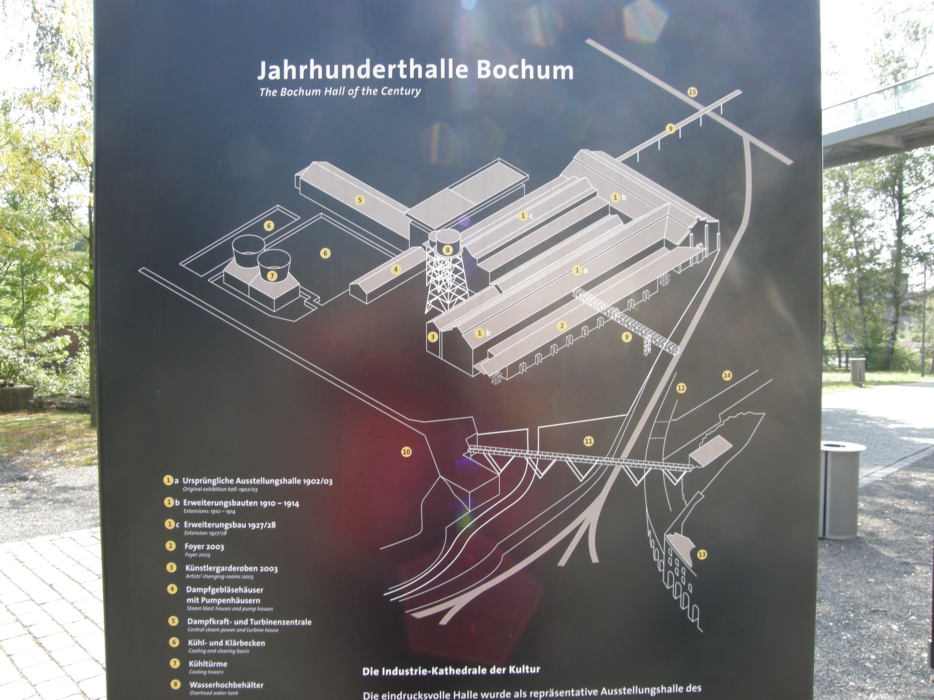 Jahrhunderthalle in Bochum Infoschild der Route der Industriekultur - Lageplan